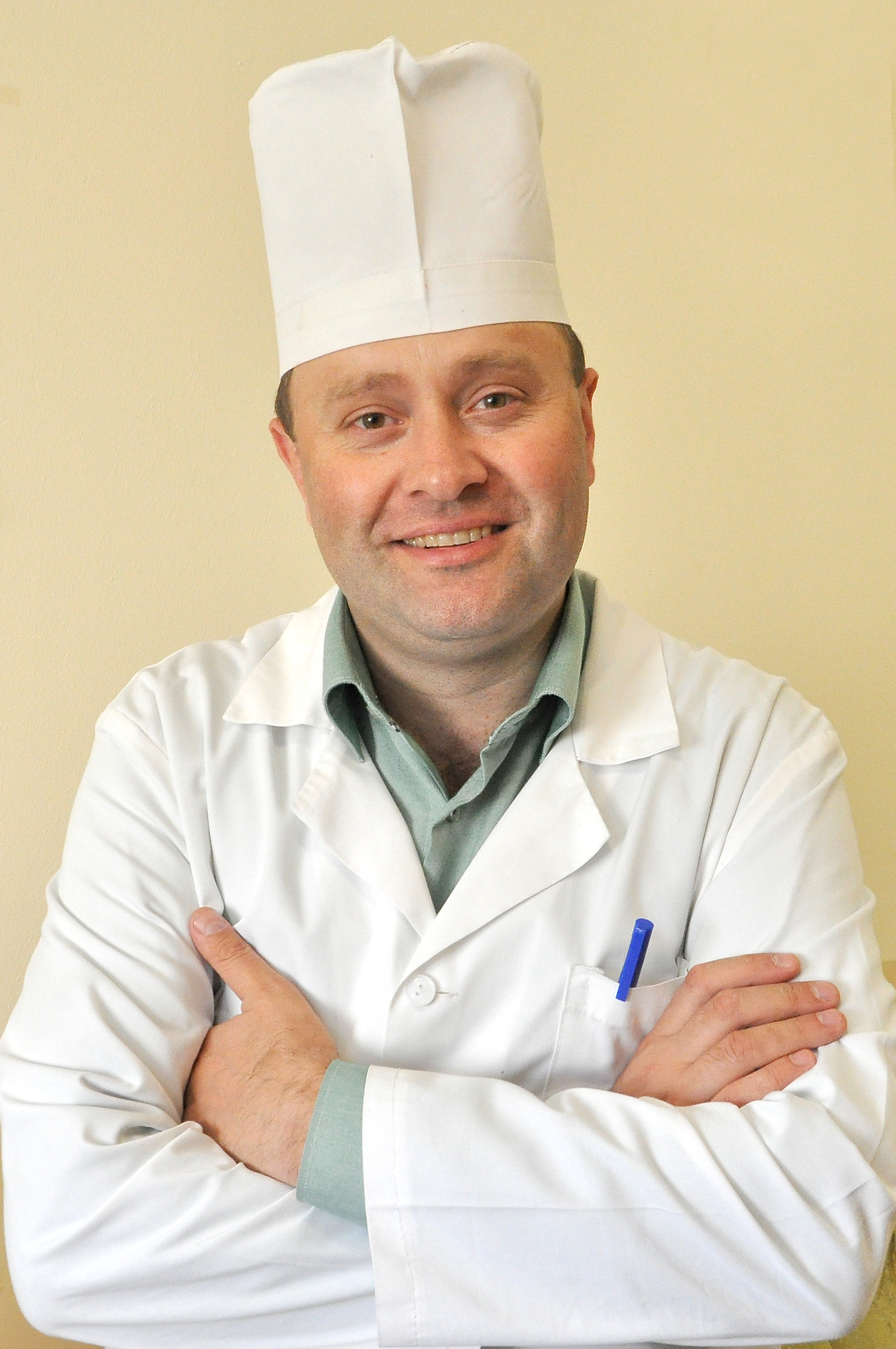 Український хірург-проктолог, співак Юрій Футуйма.